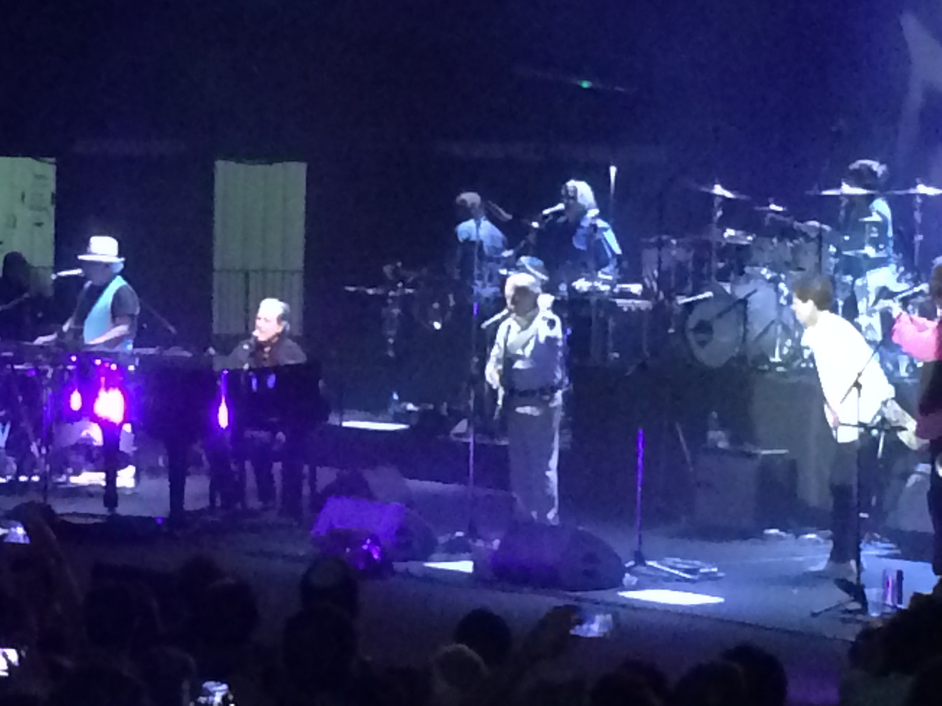 וילסון מופיע בישראל ב-2016